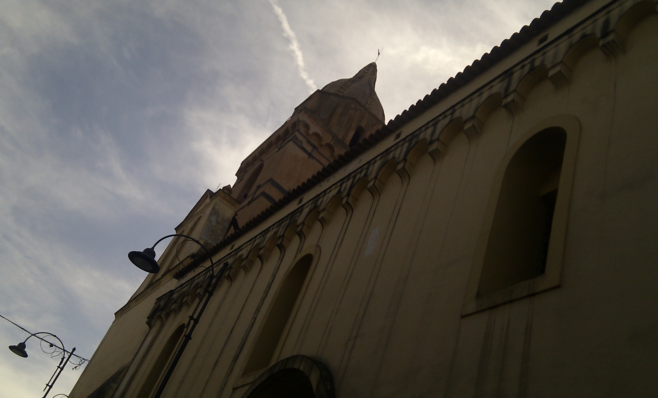 Campanile della chiesa di San Domenico di Somma Vesuviana